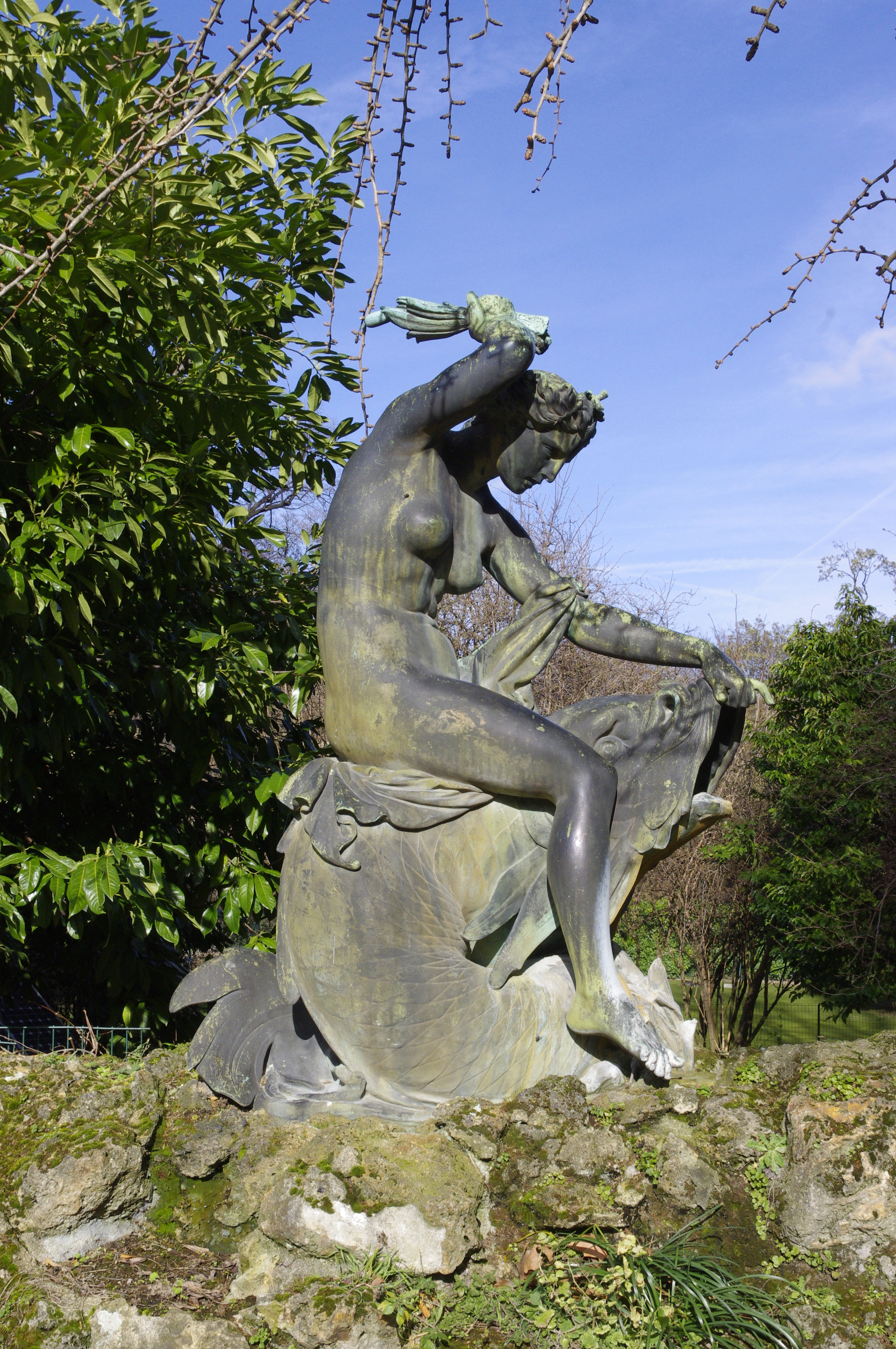 Jardin des Plantes, Paris. Sculpture Nymphe chevauchant un dauphin par Joseph Félon.